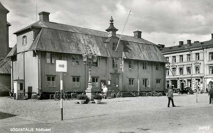 Södertälje torg med gamla rådhuset